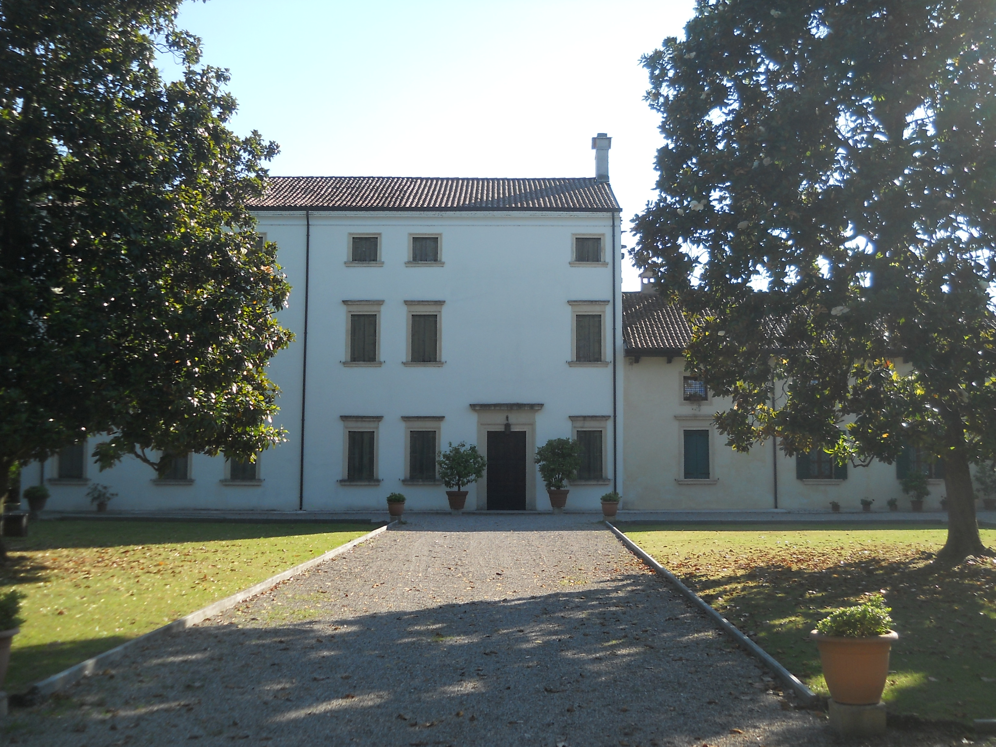 Facciata di villa Bertoldi a Settimo di Pescantina (provincia di Verona)